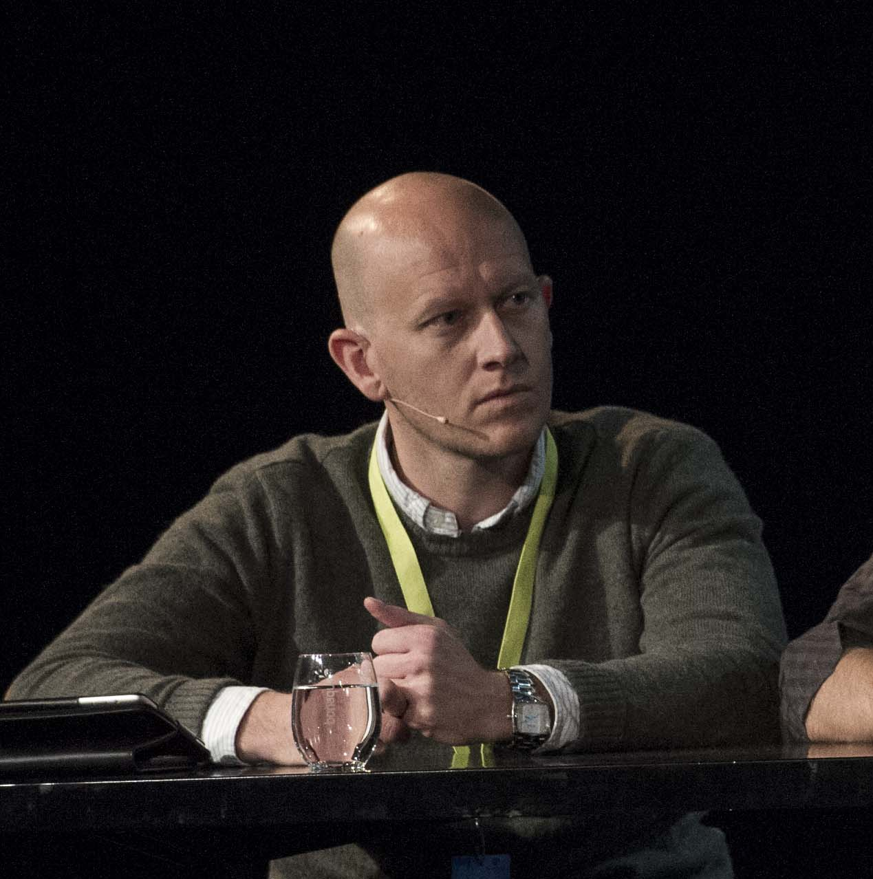 Medvirkende: Petter Bae Brandtzæg (SINTE ), Ola Stenberg (VG), Ingeborg Volan (NKR). Moderator: Anders Waage Nilsen (Netlife Research)